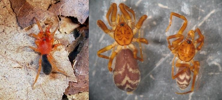 Caponiidae gallery